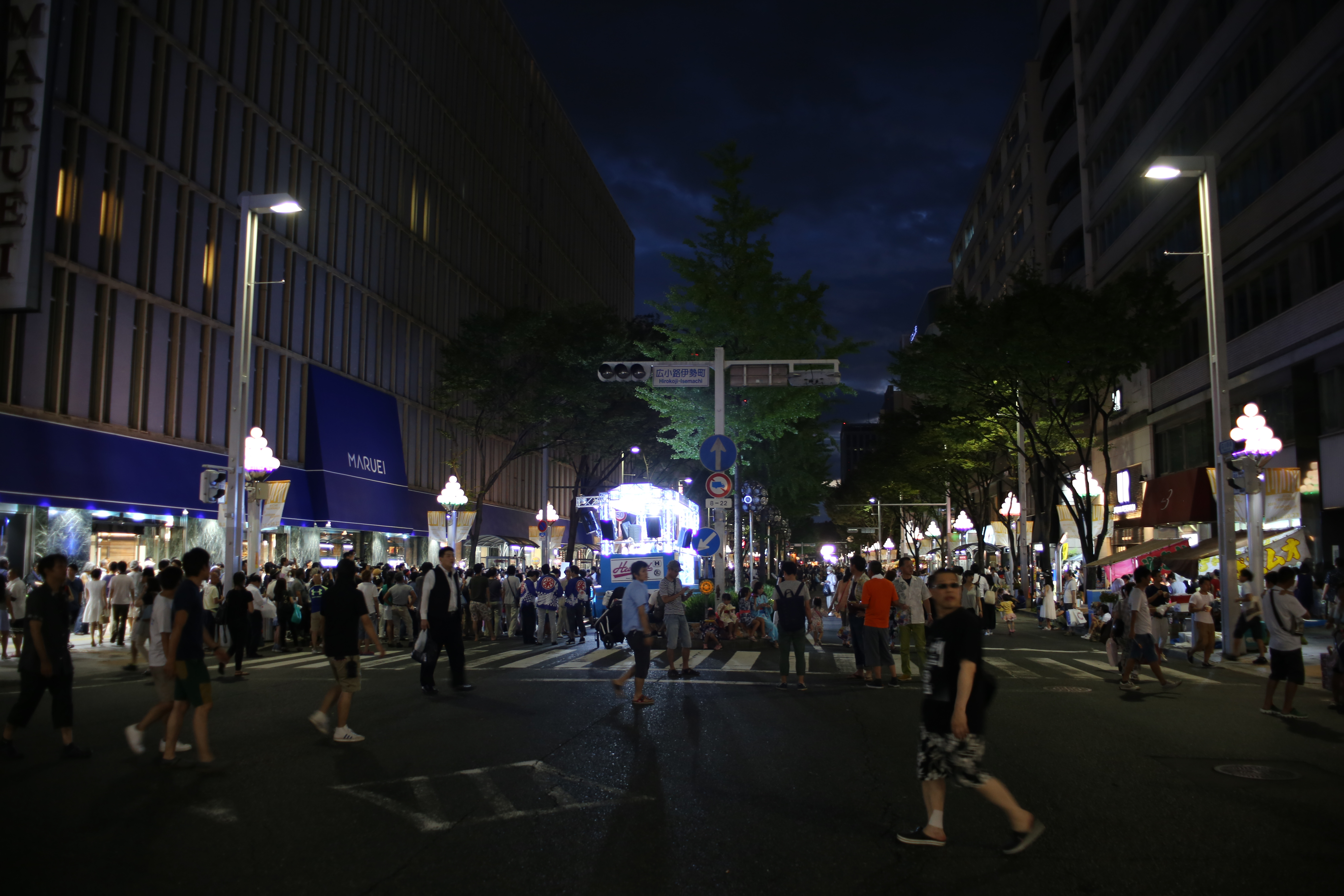 名古屋市中区の広小路夏まつりの様子を広小路伊勢町交差点より、西側に向かって撮影